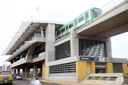 Estacion Libertador, Metro de Maracaibo